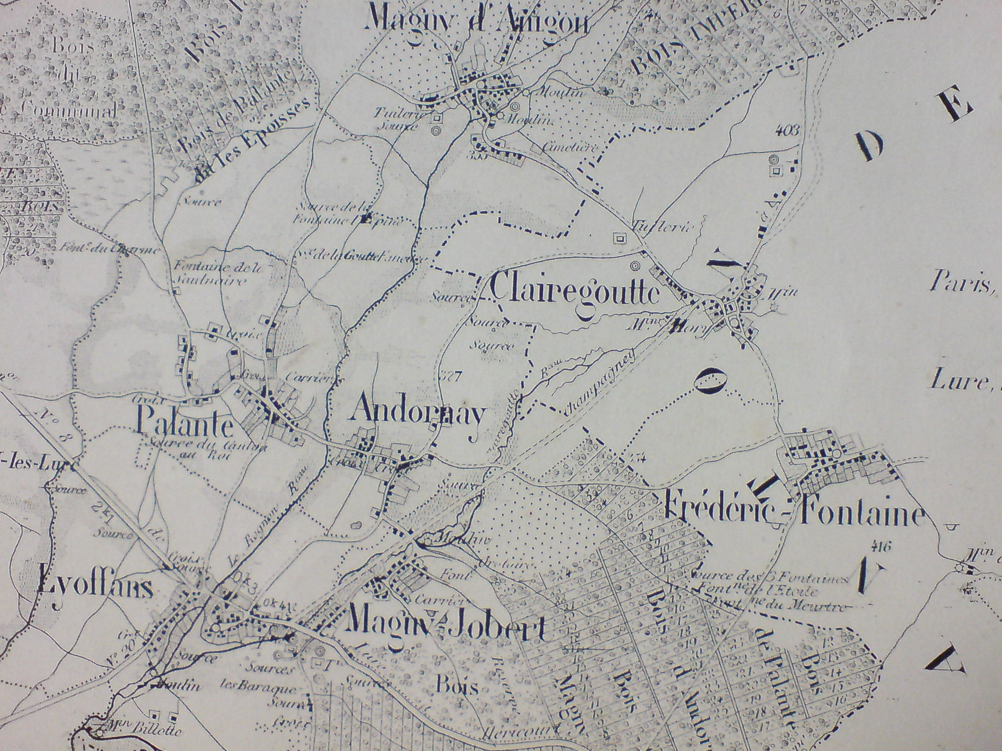 Photographie de cet ensemble de village sur l'Atlas Cantonal des communes de Haute-Saône.